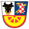 Znak obce Radvanice